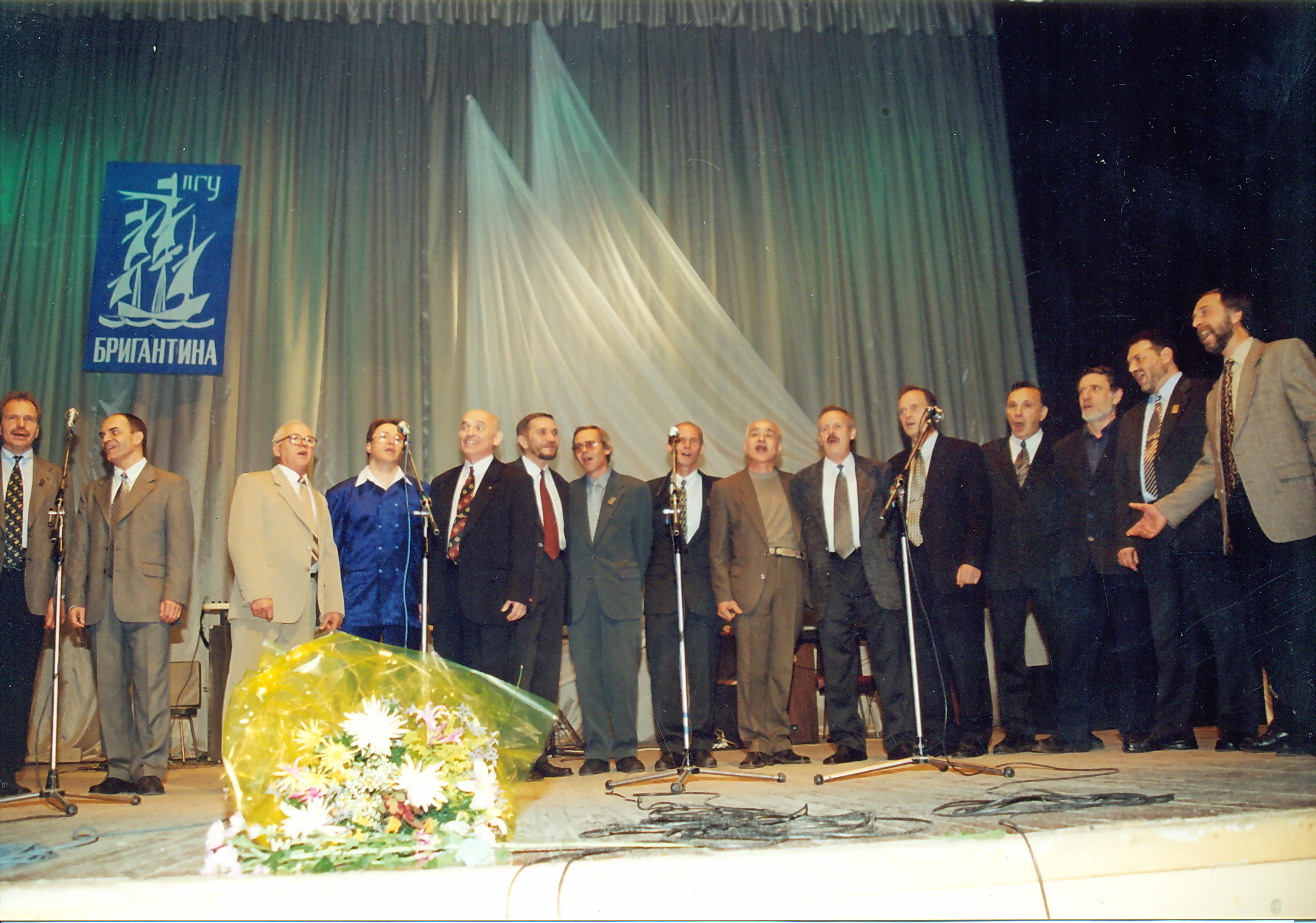 Концерт, посвященный 50-летнему юбилею ансамбля "Бригантина".